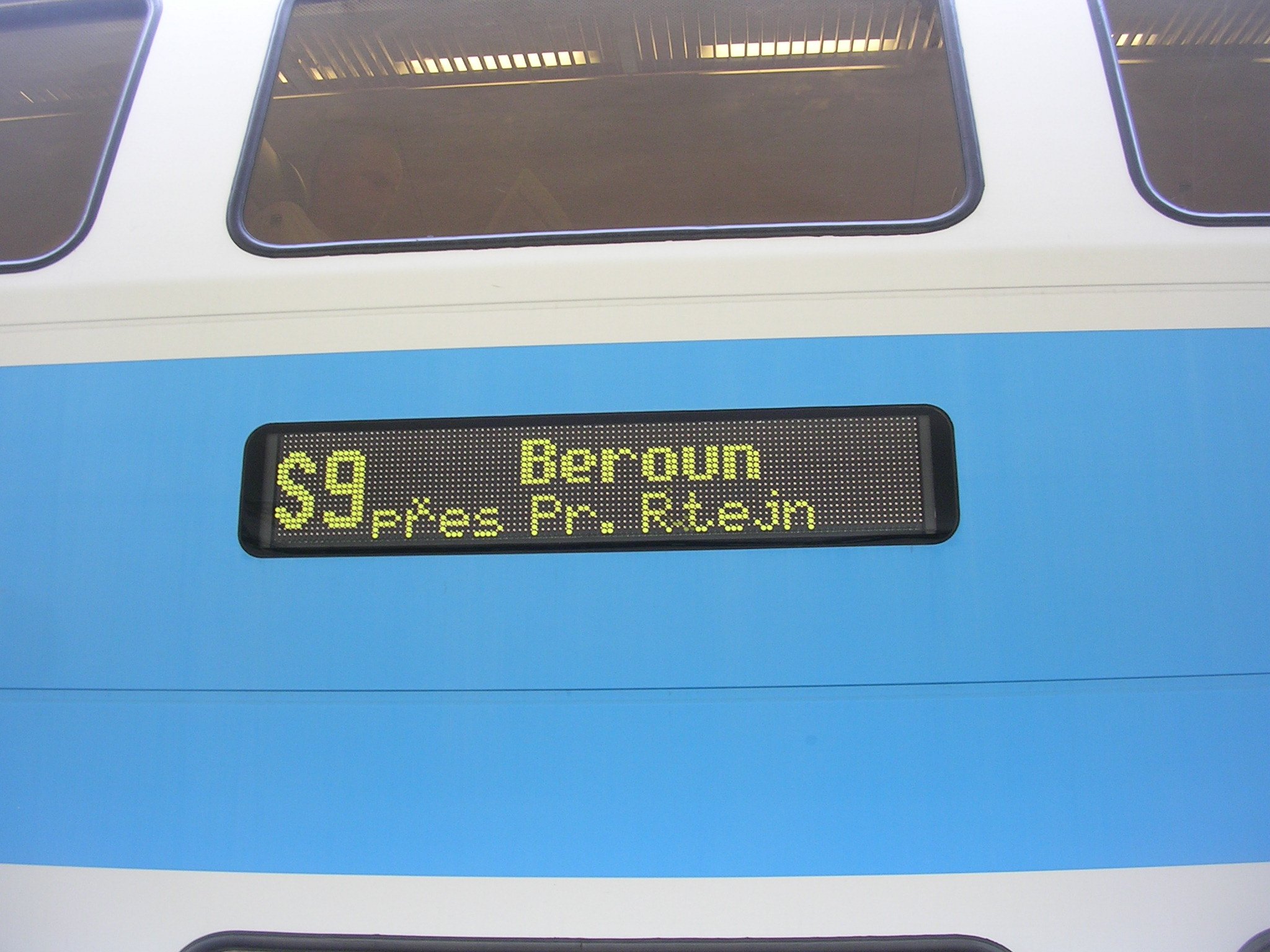 Vnější informační panel ve vlaku řady 971/471/071 na trati Praha-Beroun